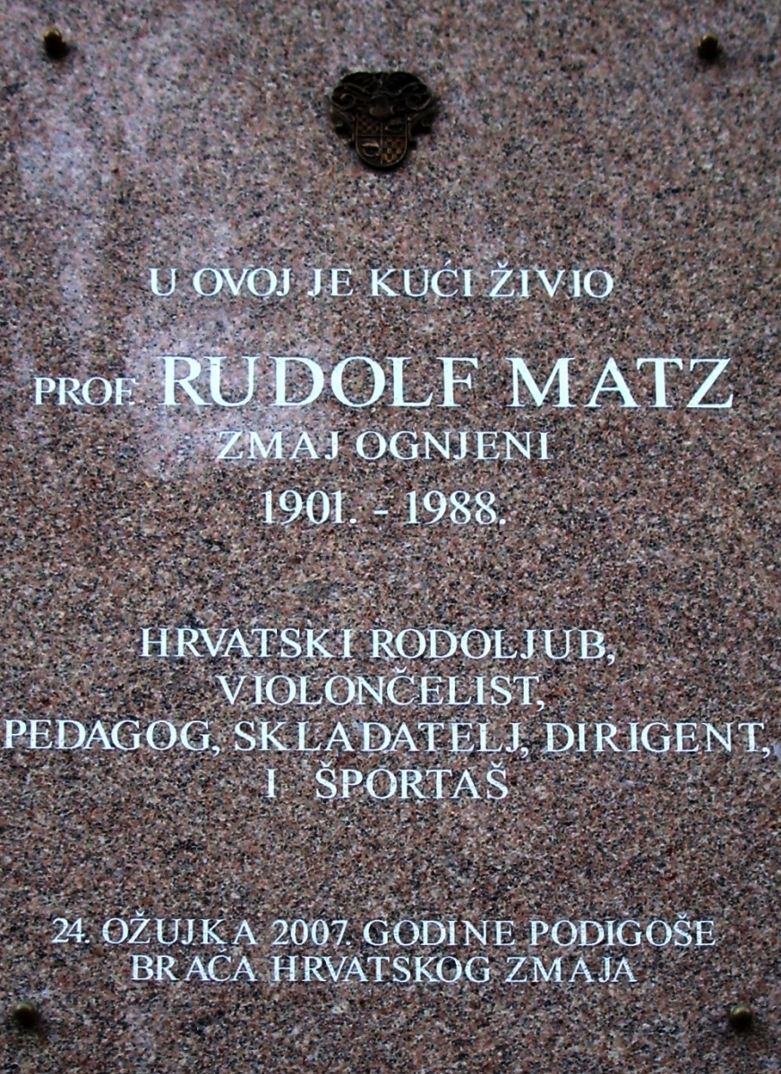 Spomen ploča u Mesničkoj ulici Rudolfu Matzu, hrvatskom skladatelju, violončelistu, komornom glazbeniku, pedagogu, koji je bio vrlo aktivan i kao dirigent i organizator glazbenog života u Zagrebu i Hrvatskoj. Uz raznolik skladateljski opus (orkestralne, komorne, glasovirske i vokalne skladbe), autor je nekoliko glazbenih udžbenika te obilja studija, članaka i kritika u stručnim glazbenim časopisima i dnevnom tisku.